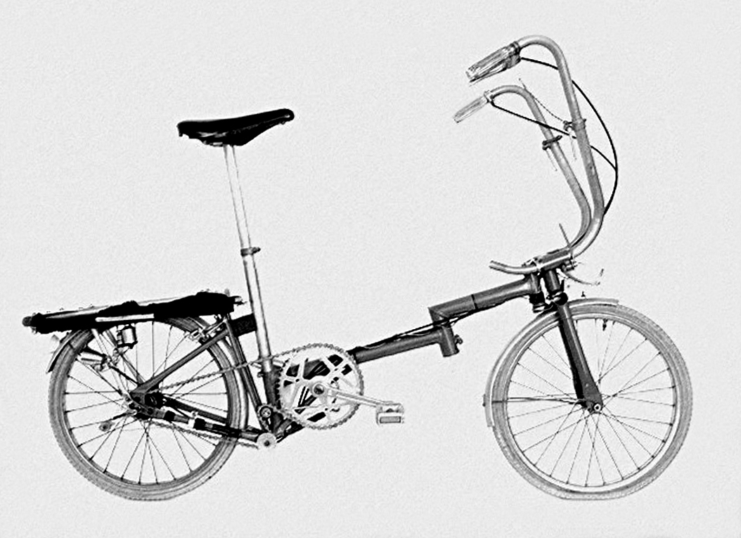 Prototype de Brompton de 1975